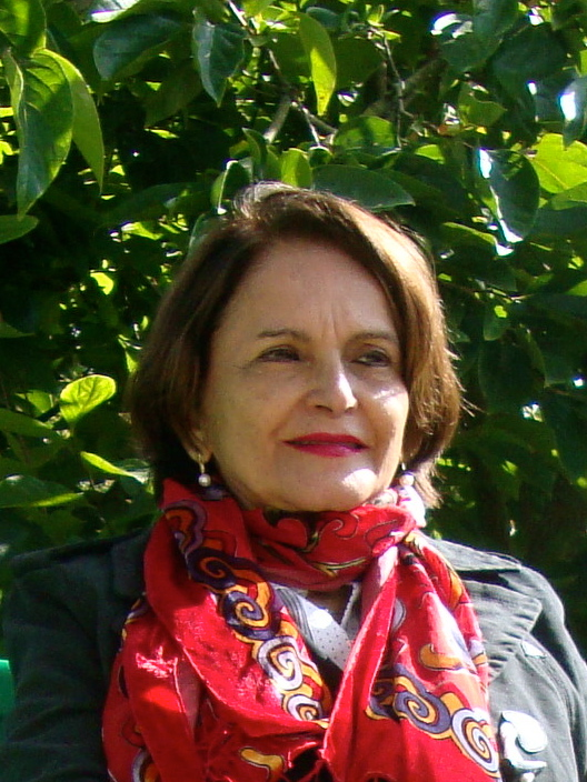 Alba Maria Zaluar de férias em Giverny, França.